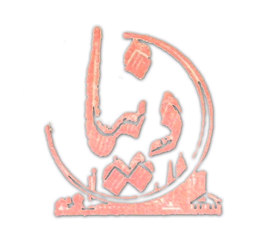 Salname e Donia - Pahlavi - Iran